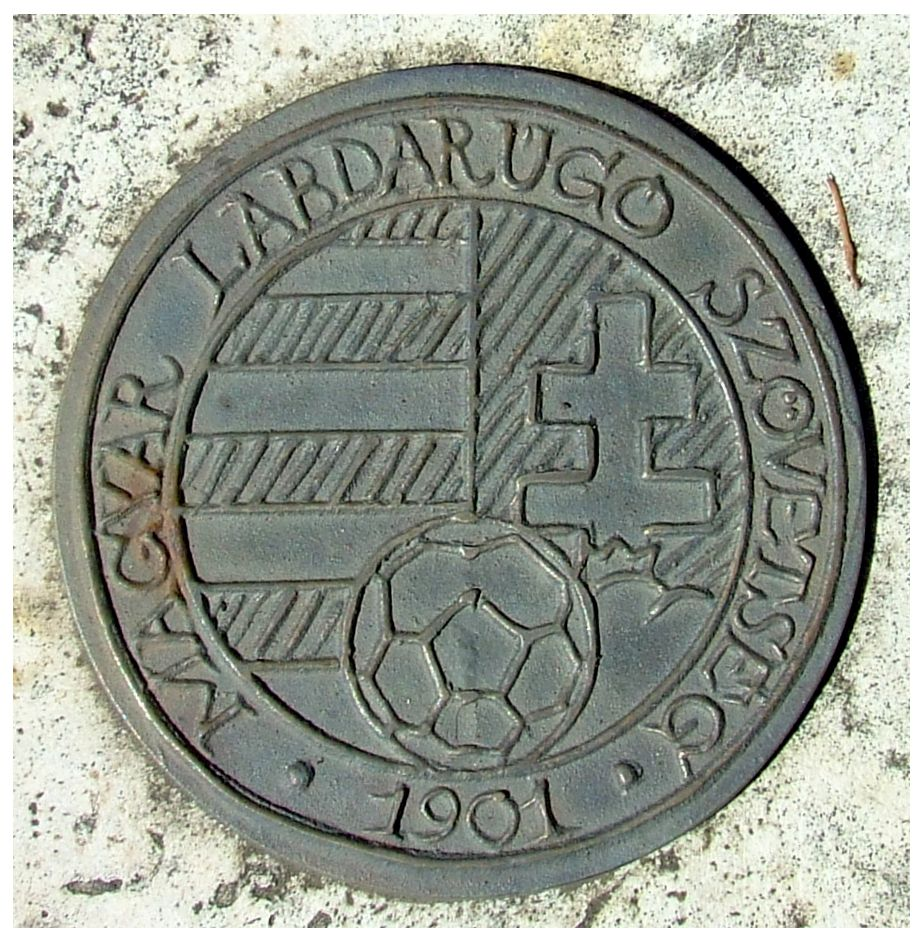 A Magyar Labdarúgó Szövetség logója. Dombormű Hidegkuti Nándor sírján. Mihály Gábor szobrászművész alkotása